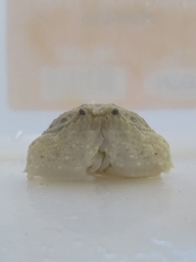 coletado na Praia do Pacheco(Pacheco Beach) 14/11/2019, caranguejo jovem encontrado em Poças de Marés .